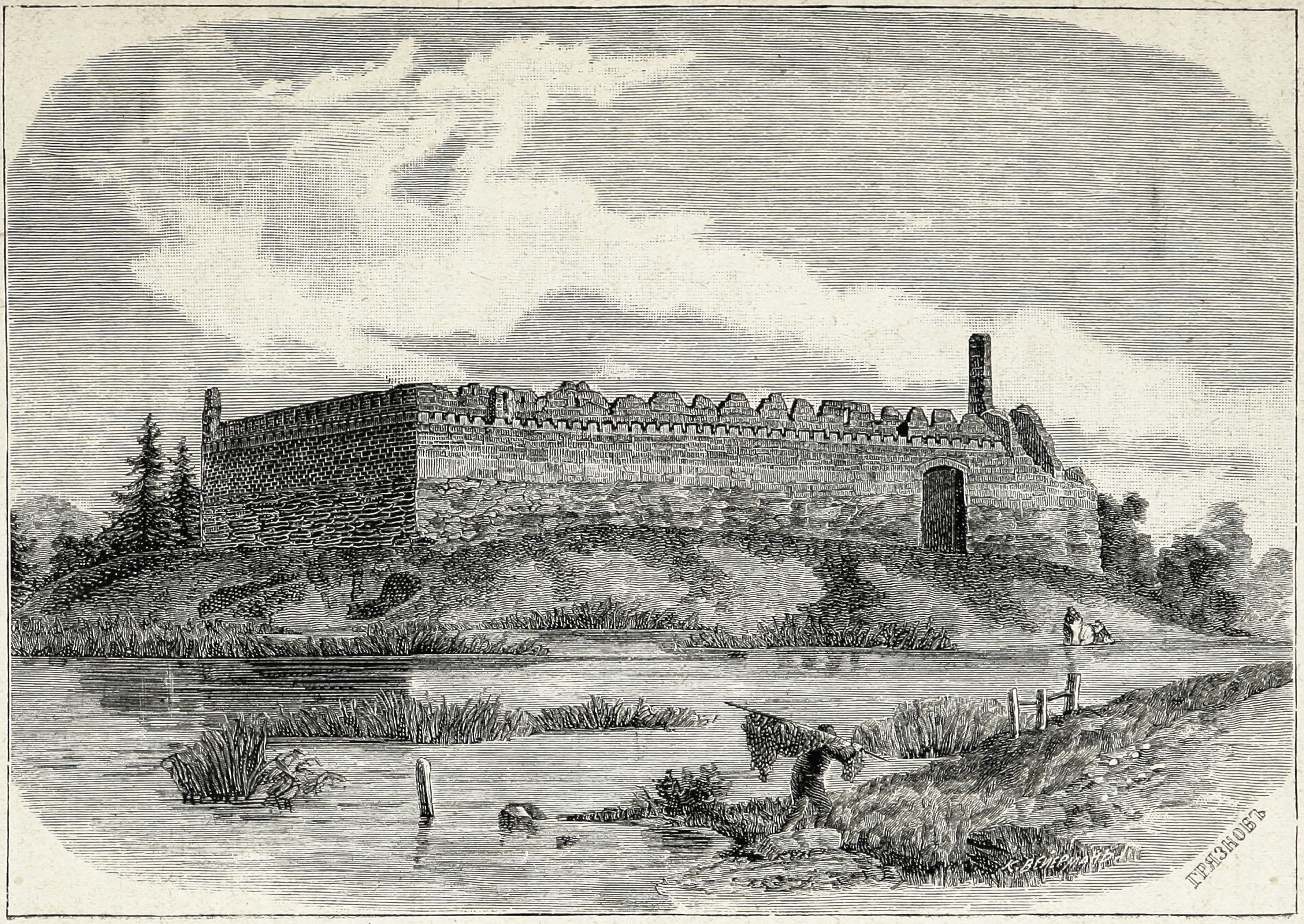 Беларуская (тарашкевіца): Ліда (Lida). Замак